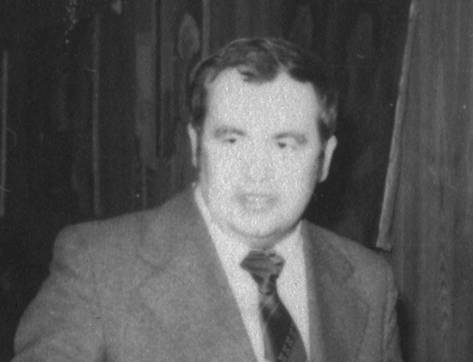 Czesław Basztura